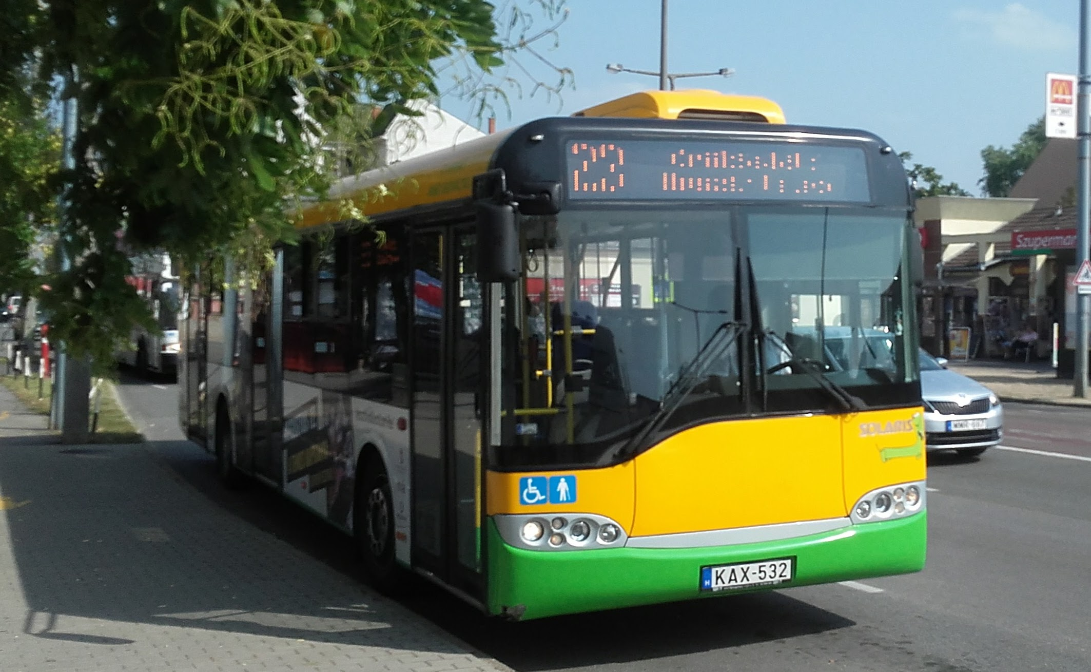 Az ÉMKK Zrt. Solaris Urbino 12 típusú busza Nyíregyházán, a Búza téren a 23-as vonalon.